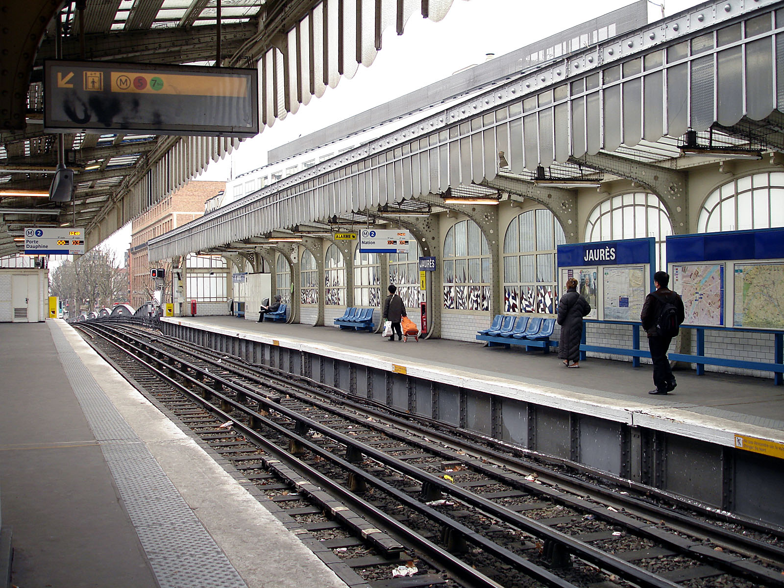 Station Jaurès de la ligne 2 du métro de Paris, France.